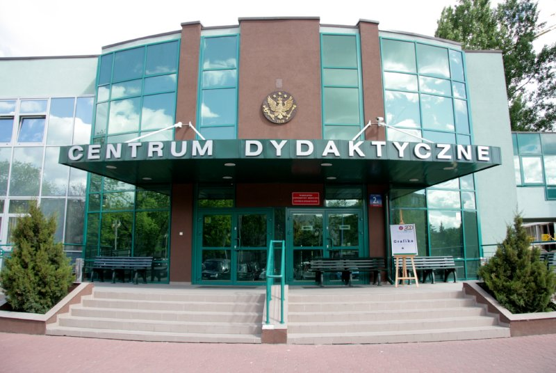 Centrum Dydaktyczne Warszawskiego Uniwersytetu Medycznego